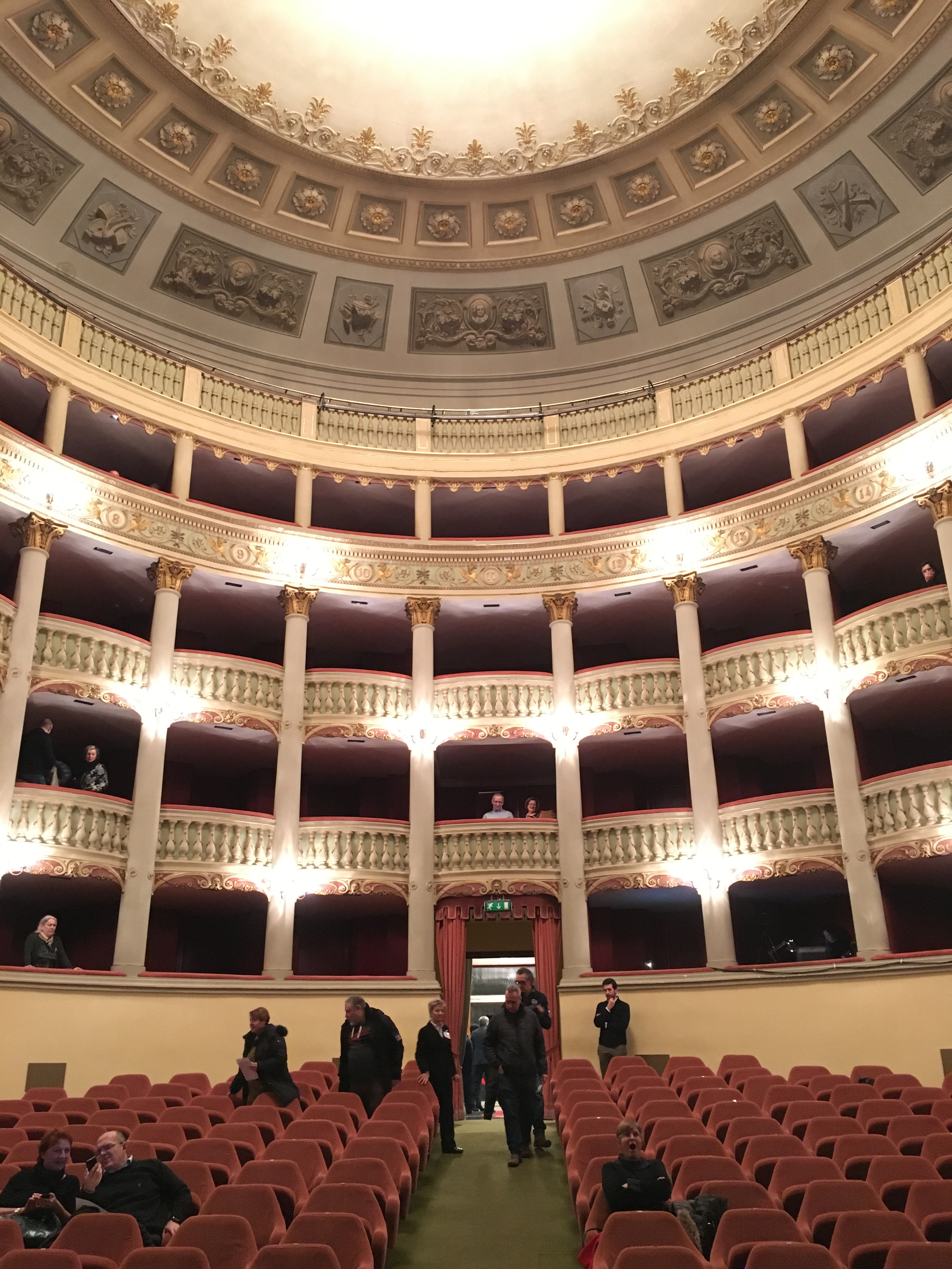 Teatro Metastasio Prato. Sala